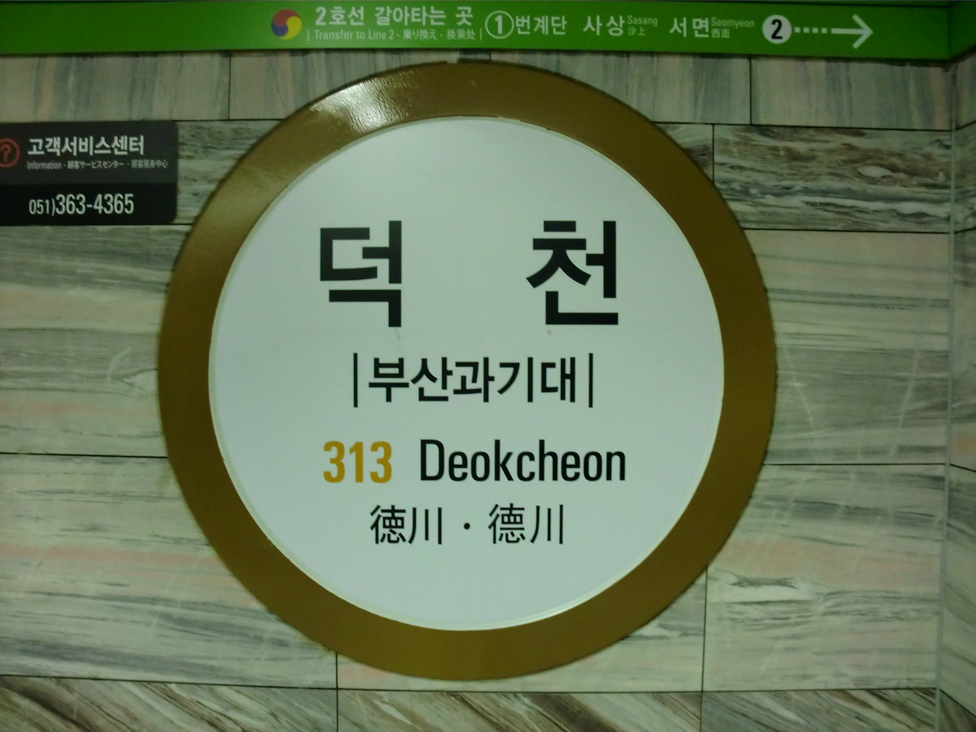 부산도시철도 3호선 덕천역의 역명판